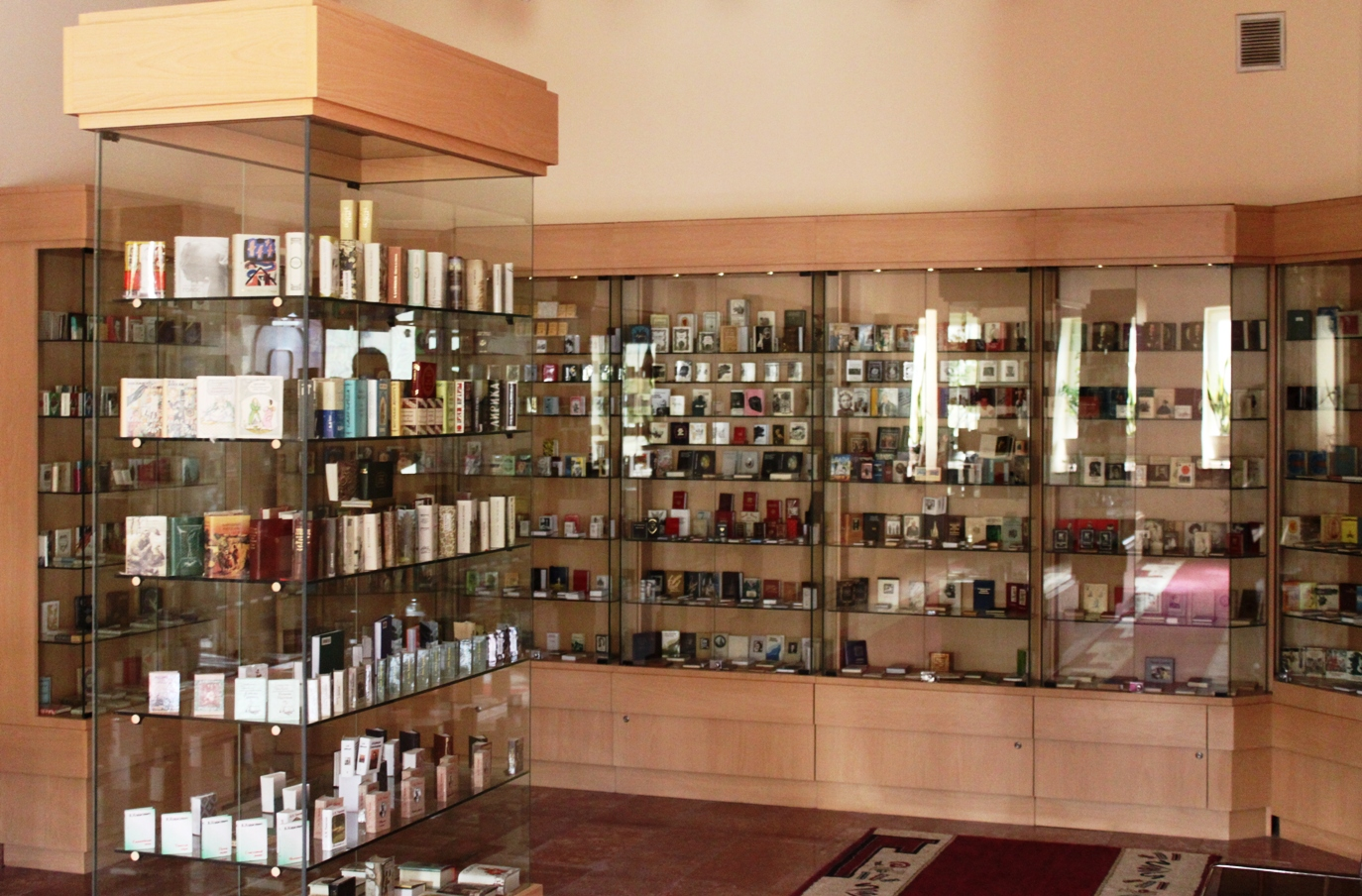 Экспозиция музея миниатбрных книг в Баку.